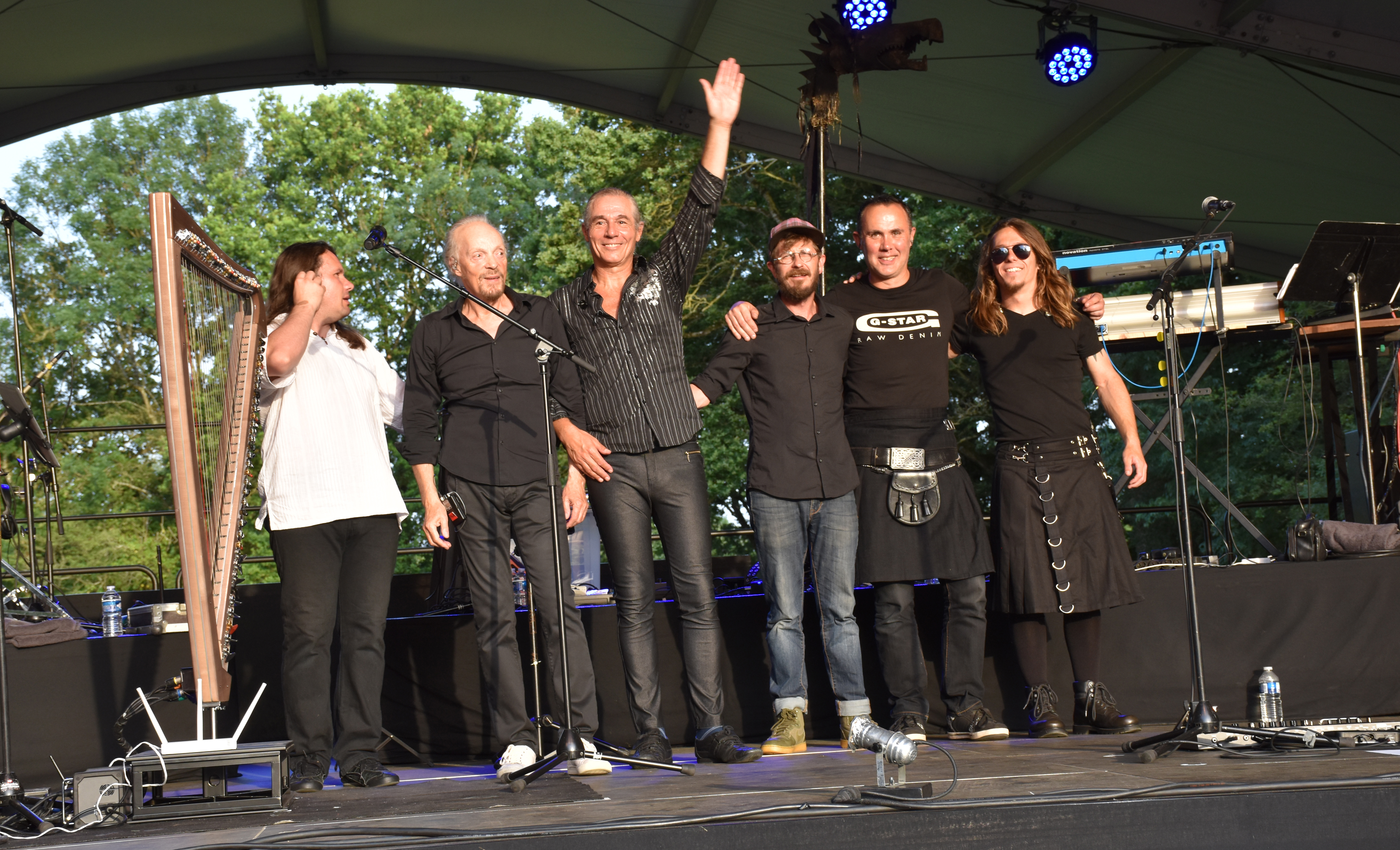 Marc « Marc de Ponkallec » Hazon en Vendée le 30 juin 2019 avec Alan Stivell